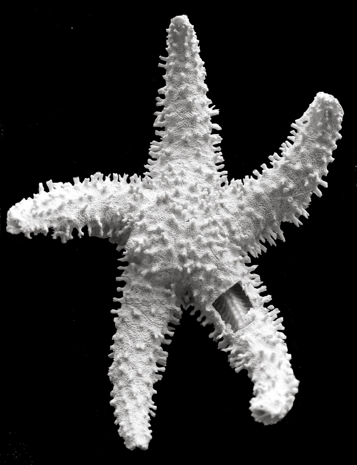 L'étoile de mer Clavaporania fitchorum.